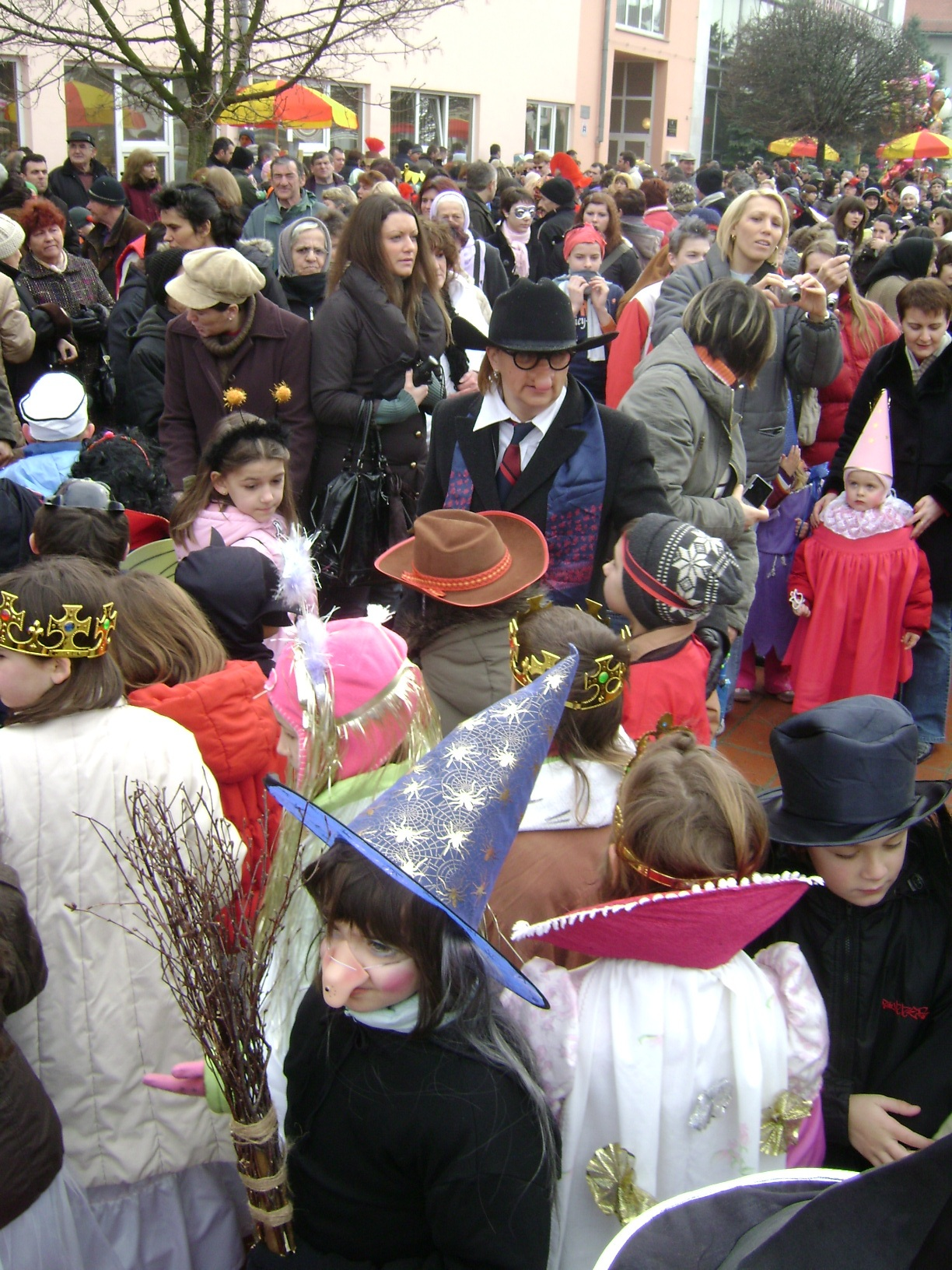 Pokladni karneval u Belom Manastiru